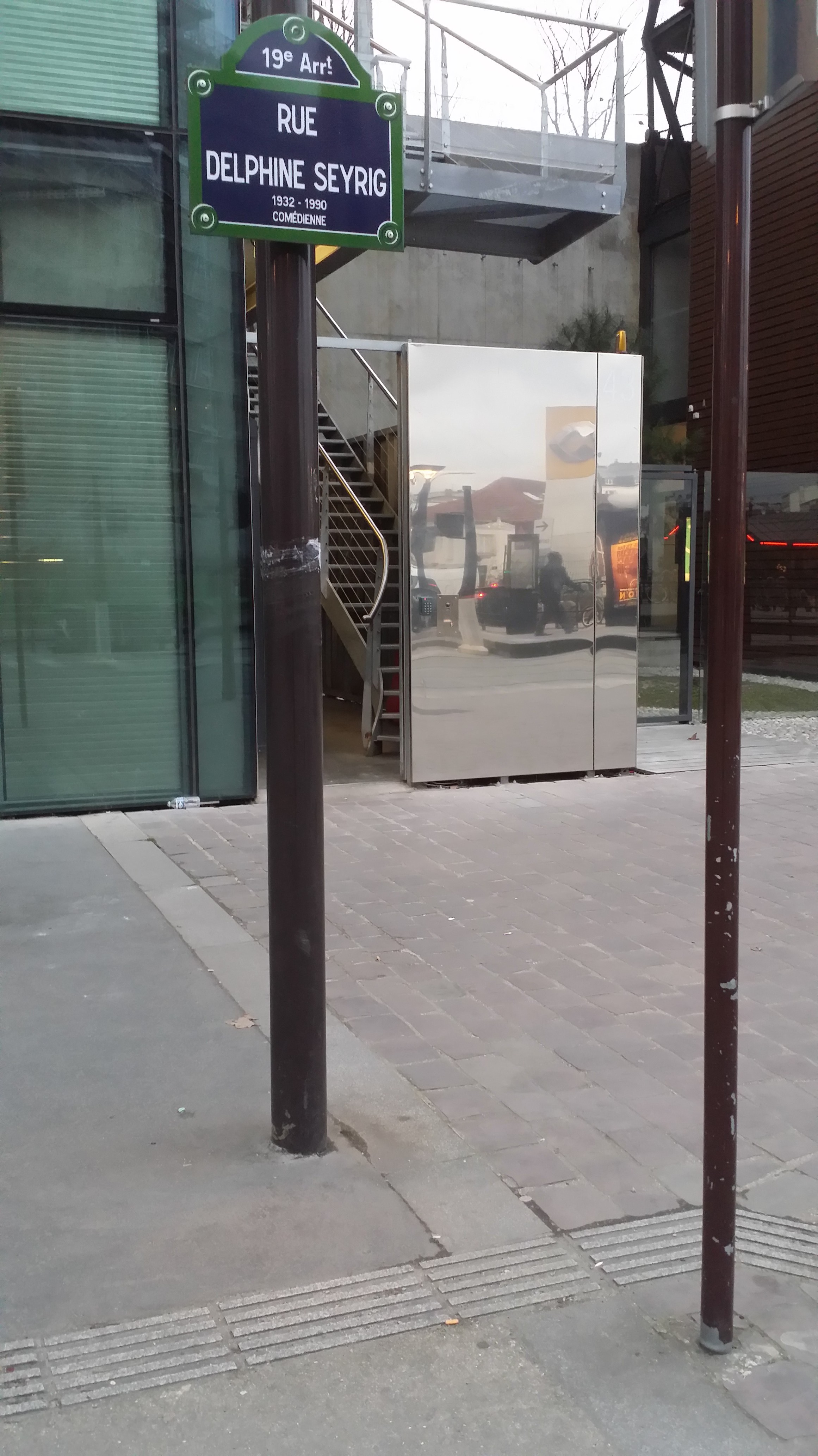 Rue Delphine-Seyrig (Paris)